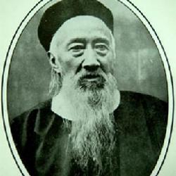 Zhang Zhidong Former Residence